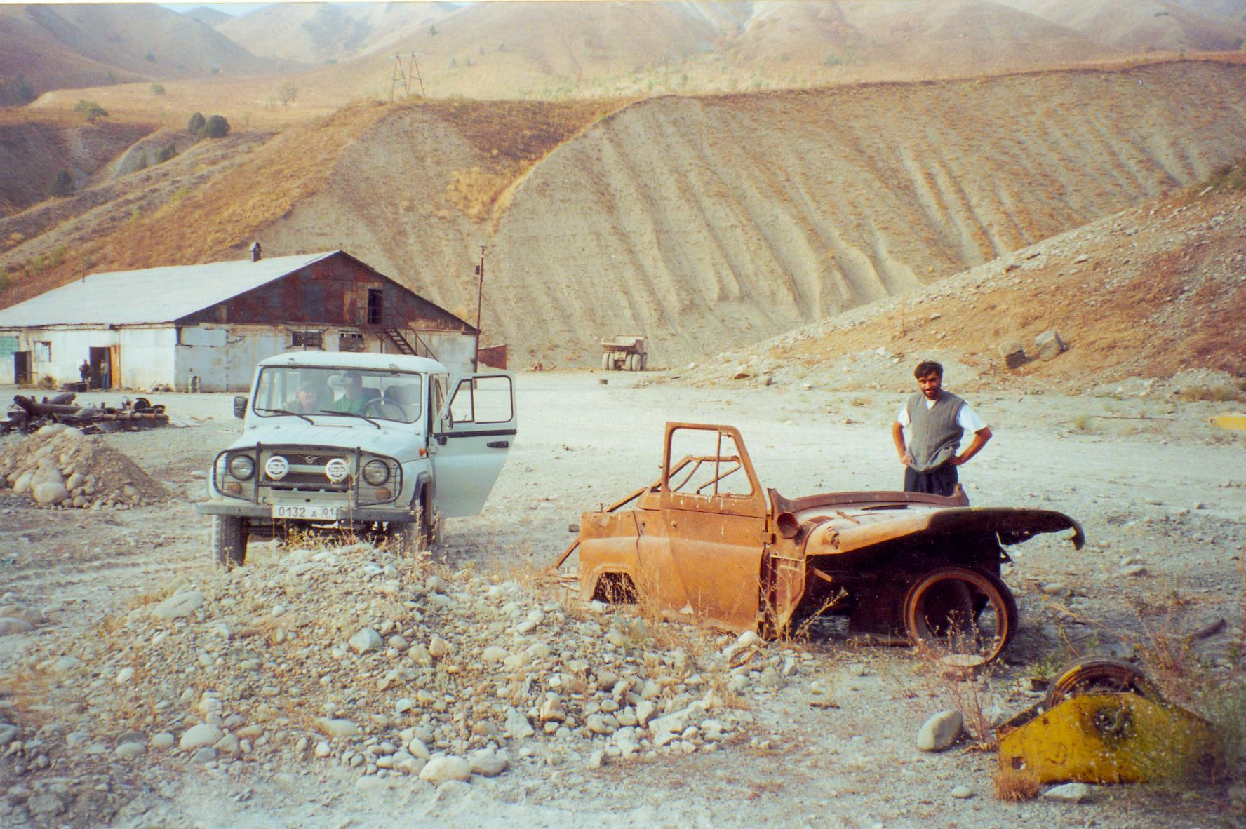 UAZ-469 in Tajikistan.